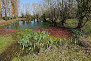 Mare Darblay à Chauffour lès étrechy